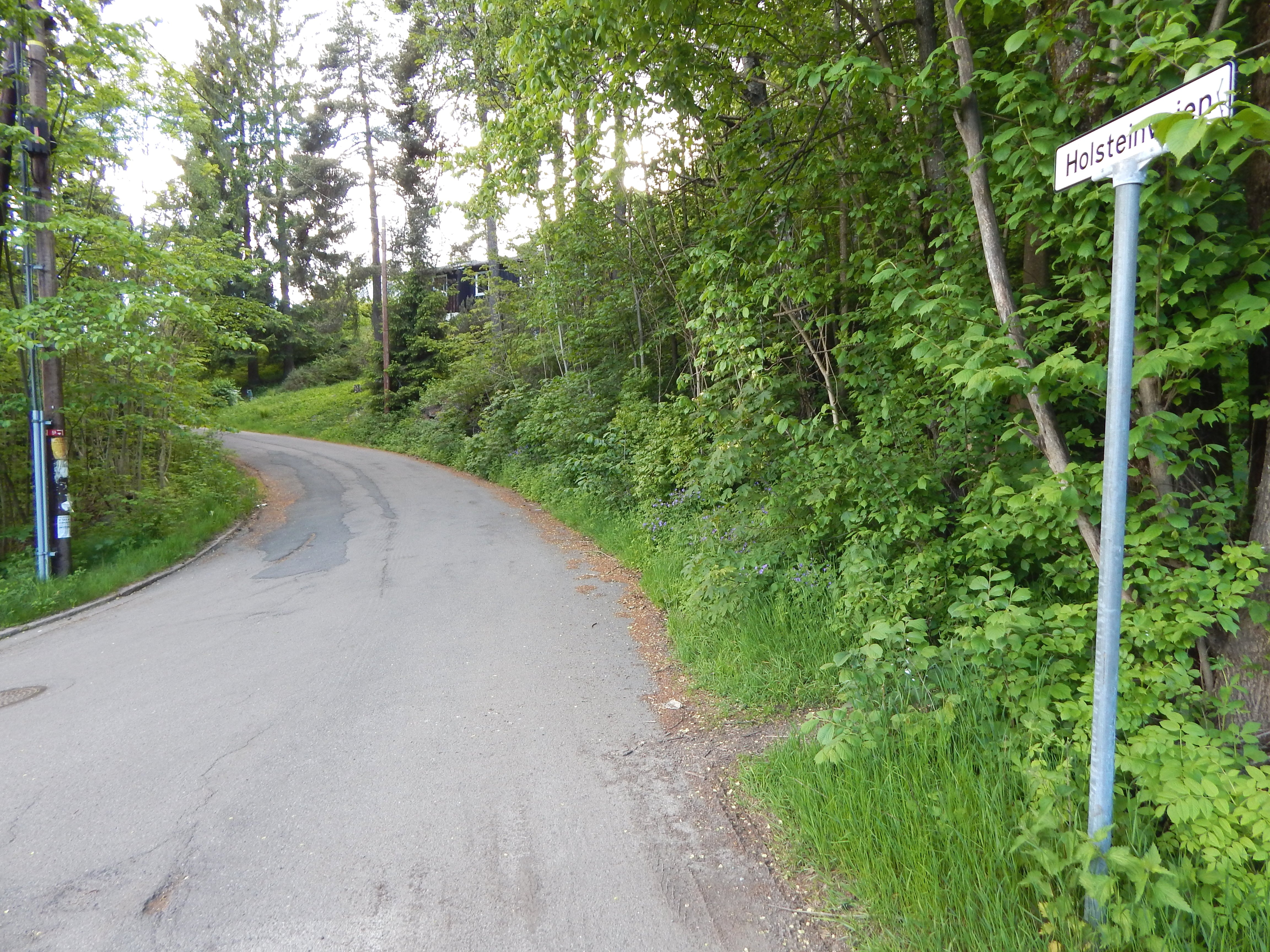 Holsteinveien i enden mot Nilserudkleiva